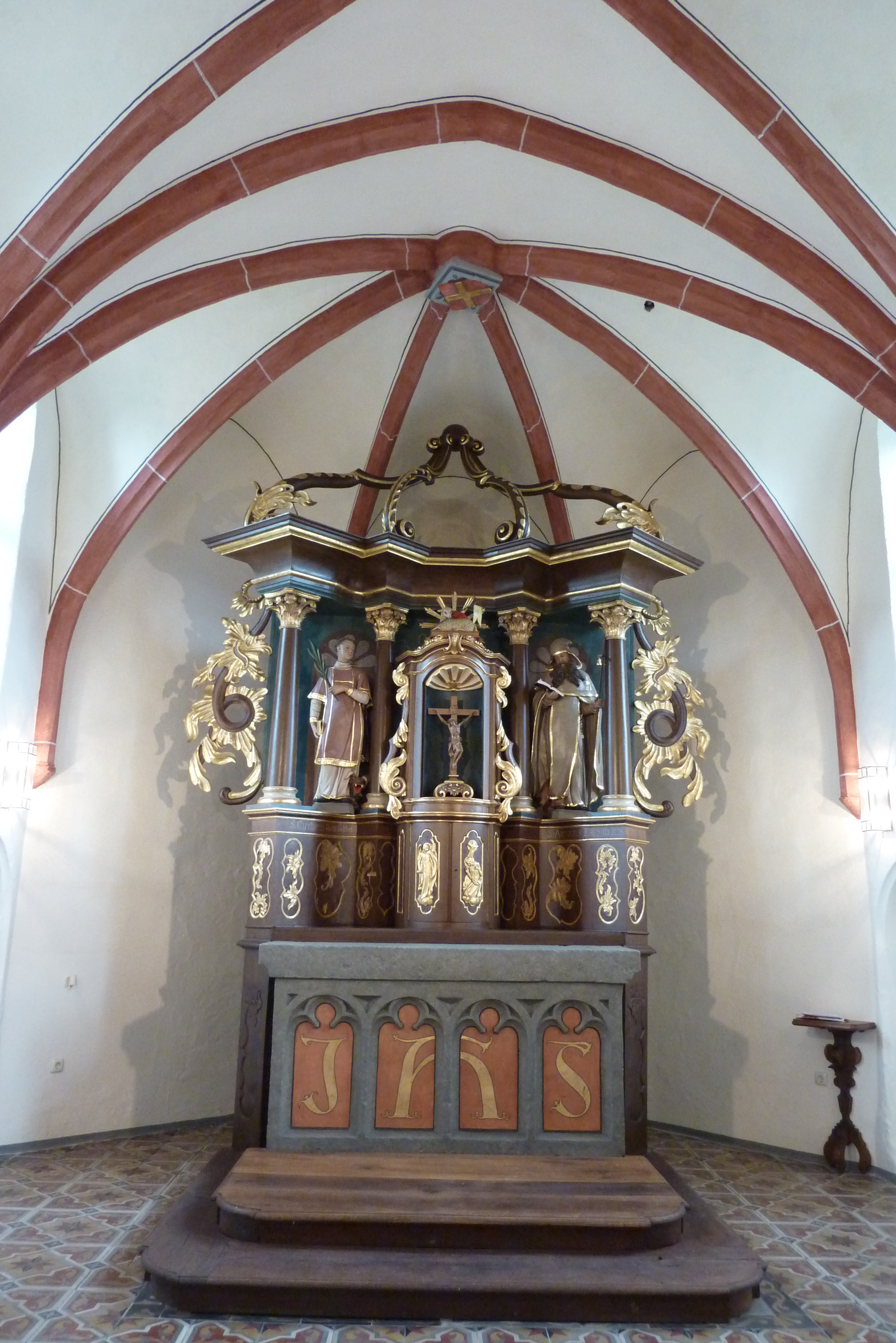 katholische Kirche St. Cyriakus in Dümpelfeld, Chor mit Hauptaltar und Kreuzrippengewölbe